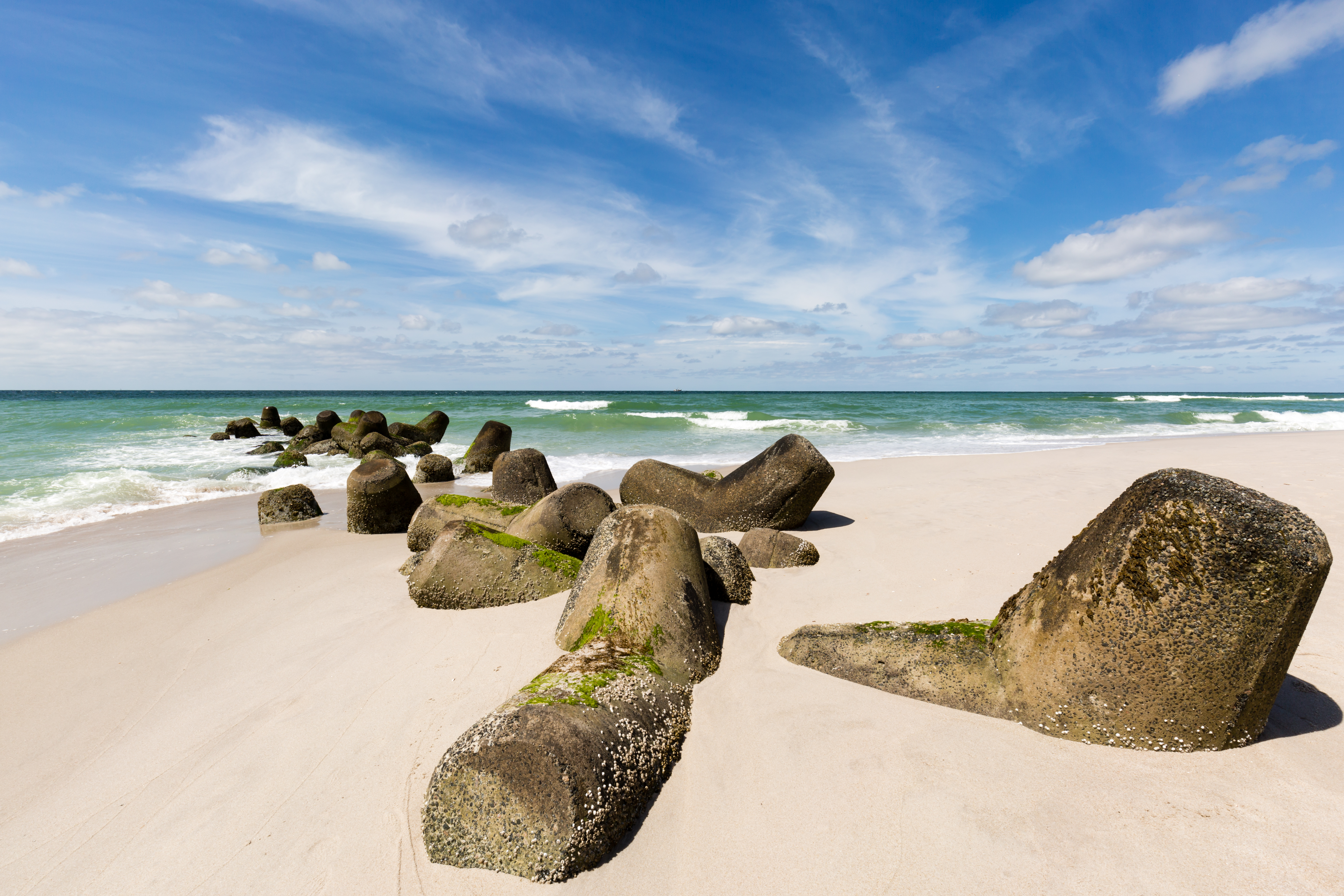 Beton-Tetrapoden am Strand von Hörnum/Sylt